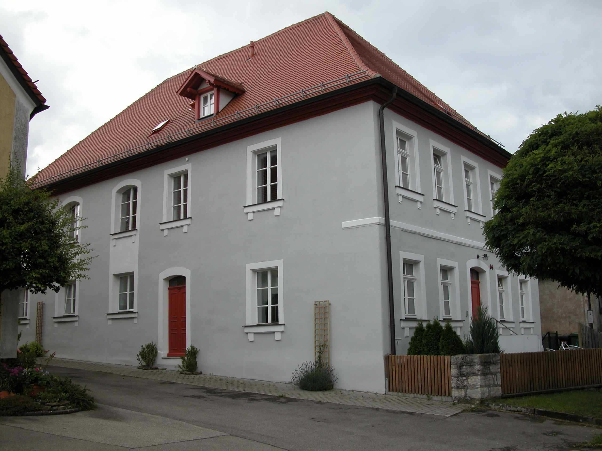 Cronheim 66